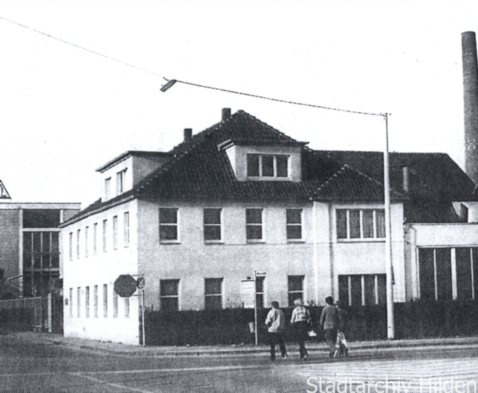 Stückfärberei Schlieper & Laag Hauptgebäude an der Hofstraße, Ecke Neustraße; Hilden